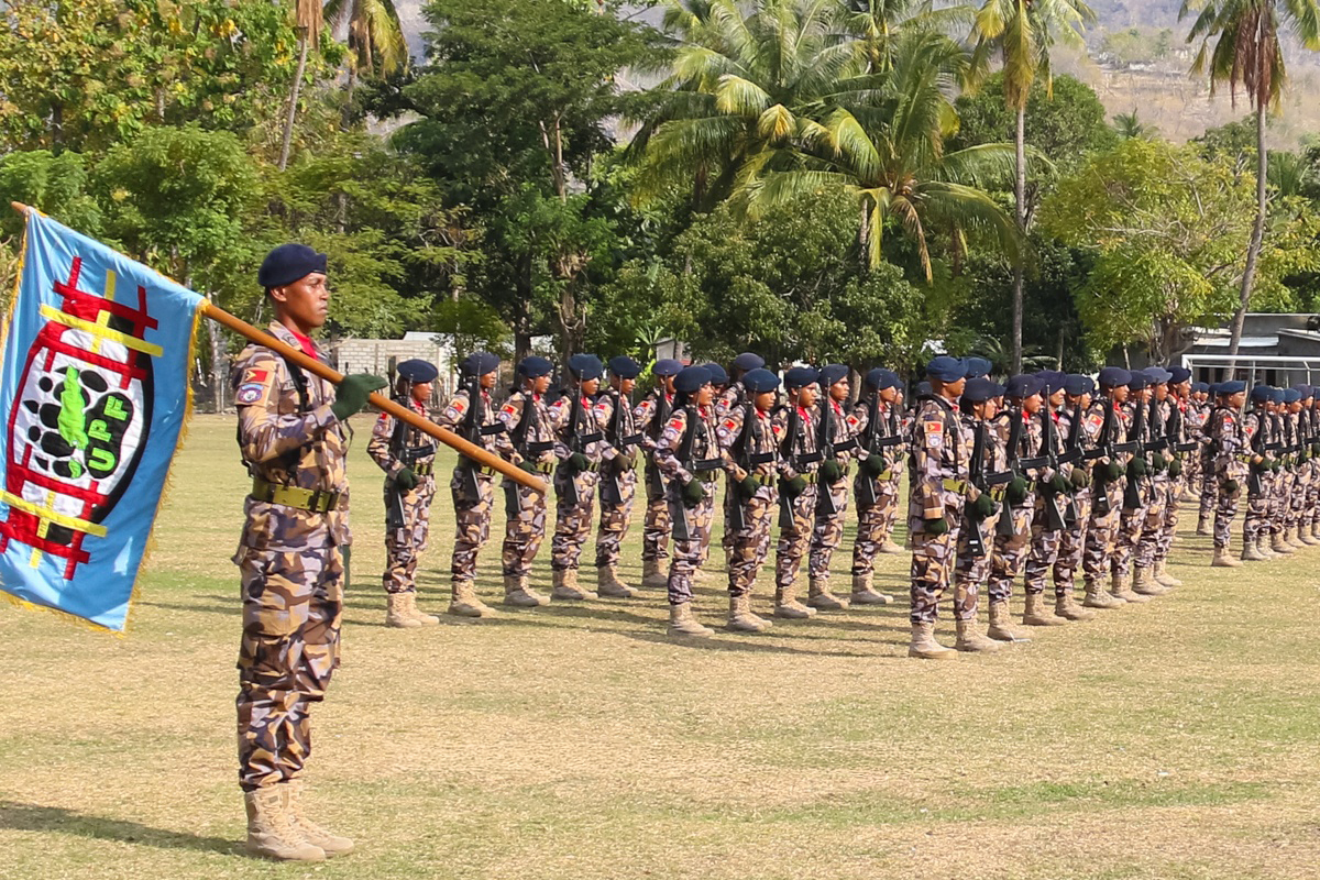 Osttimoresische Grenzpolizei (Unidade da Polícia de Fronteiras UPF)